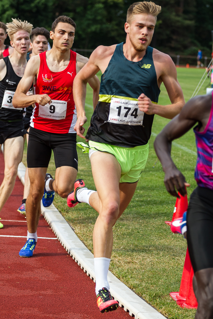 Laufgala des TSV Pfungstadt am 3. Juni 2017.